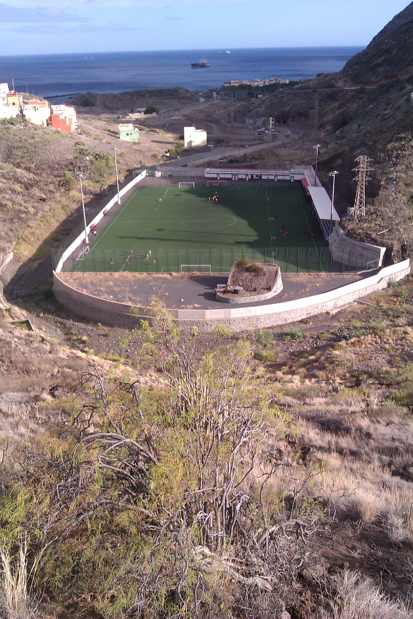 Imagen del nuevo campo de fútbol de San Andrés (Tenerife).